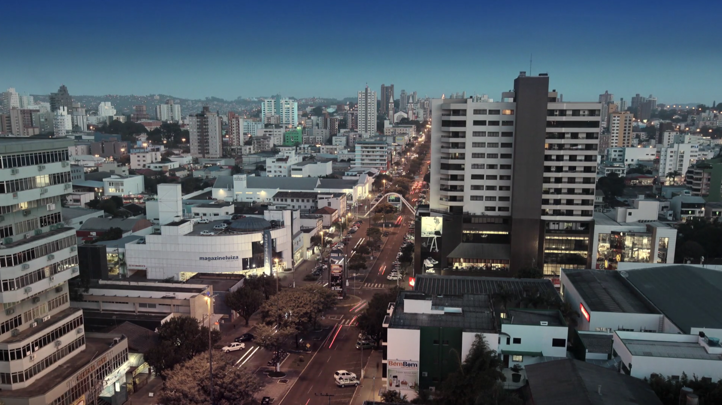 Vista do centro de Chapeco SC